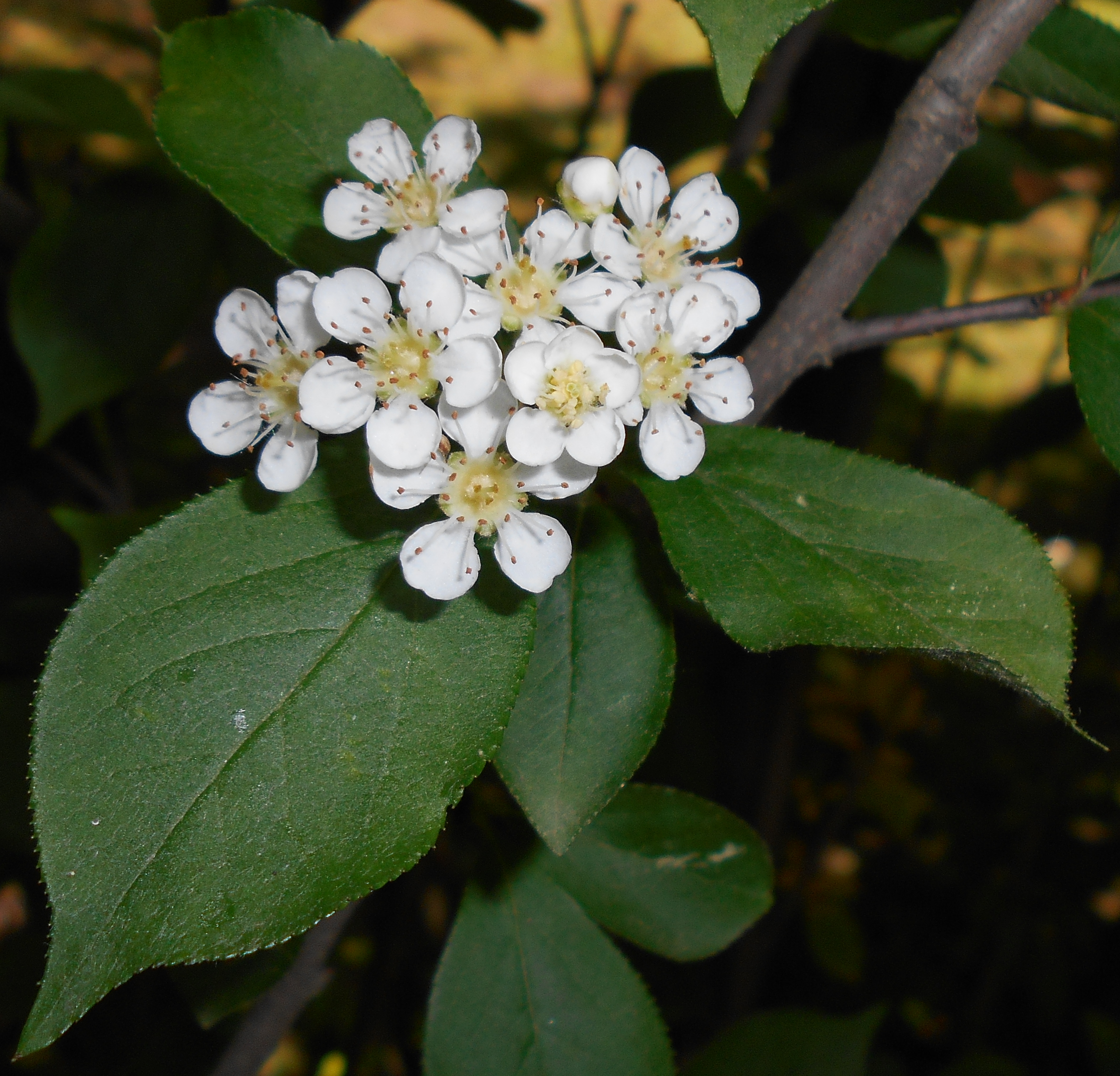 Głogownik kosmaty (Photinia villosa), Ogród Botaniczny UMCS, Lublin, Polska.